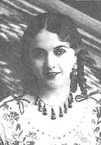 Fotografía de la cantante mexicana Lupe Rivas Cacho publicada en 1926 con motivo de una inminente gira que iba a realizar por España al frente de su compañía.